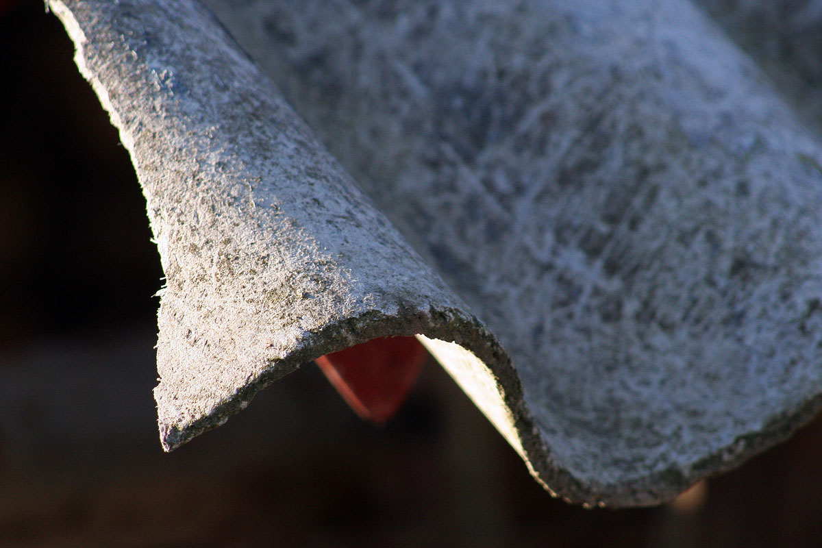 Eternit